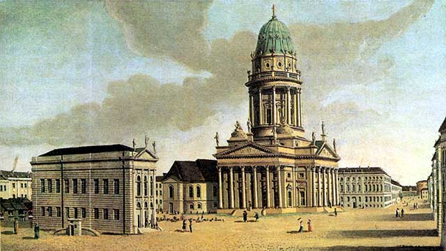 Ansicht des Berliner Gendarmenmarkts mit französischem Dom und französischem Komödienhaus.